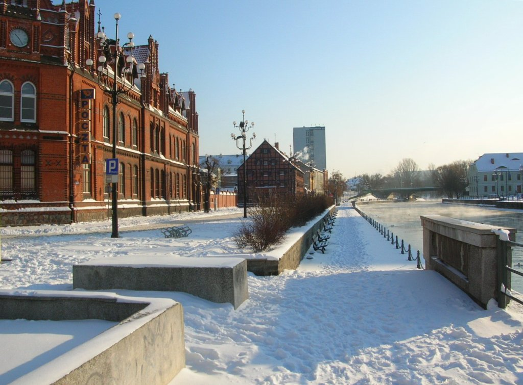 Ulica Stary Port i bulwar nad Brdą w Bydgoszczy